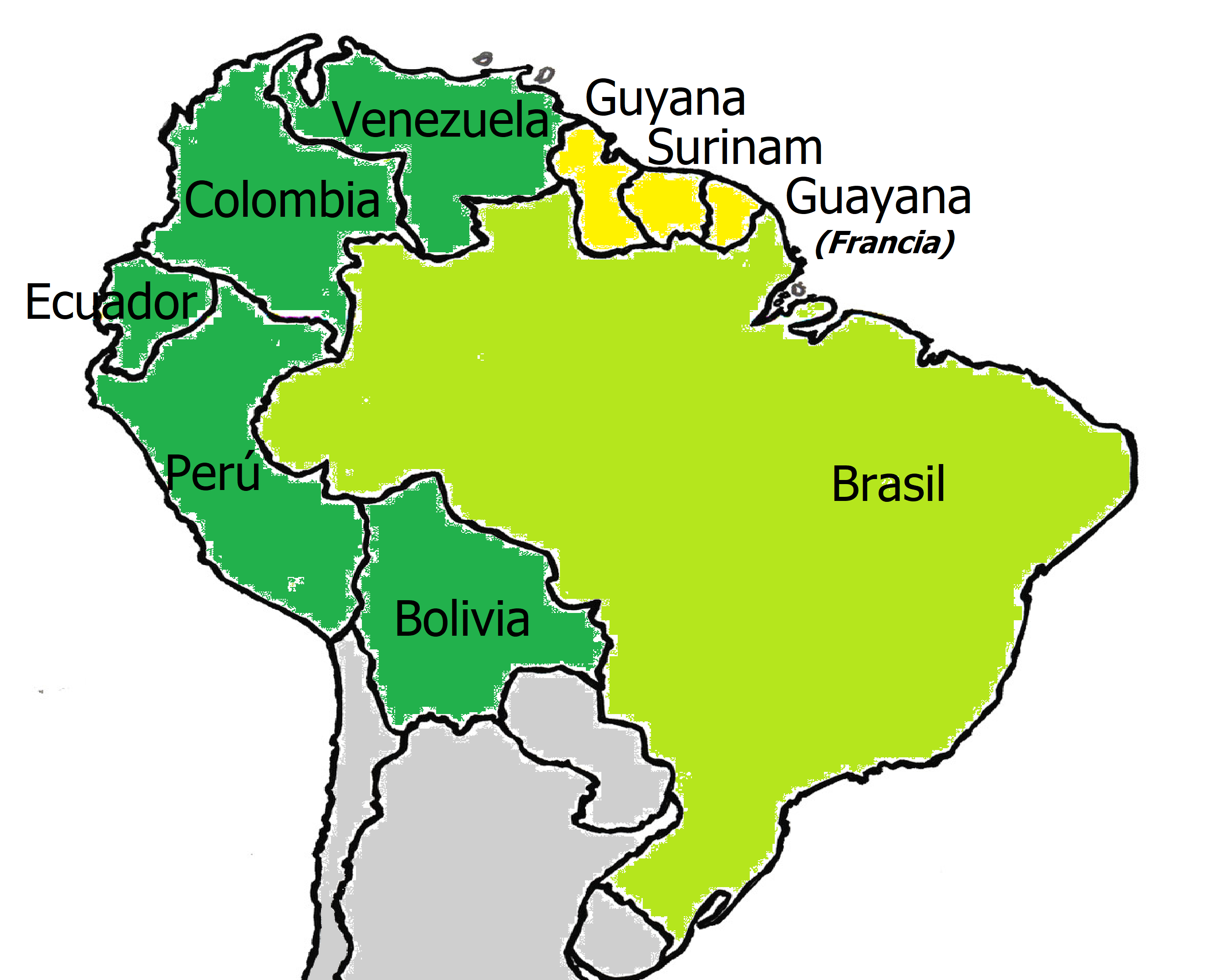 Panamazonia